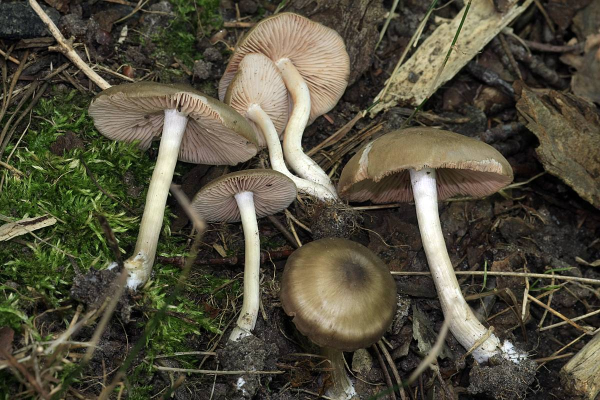 Entoloma clypeatum